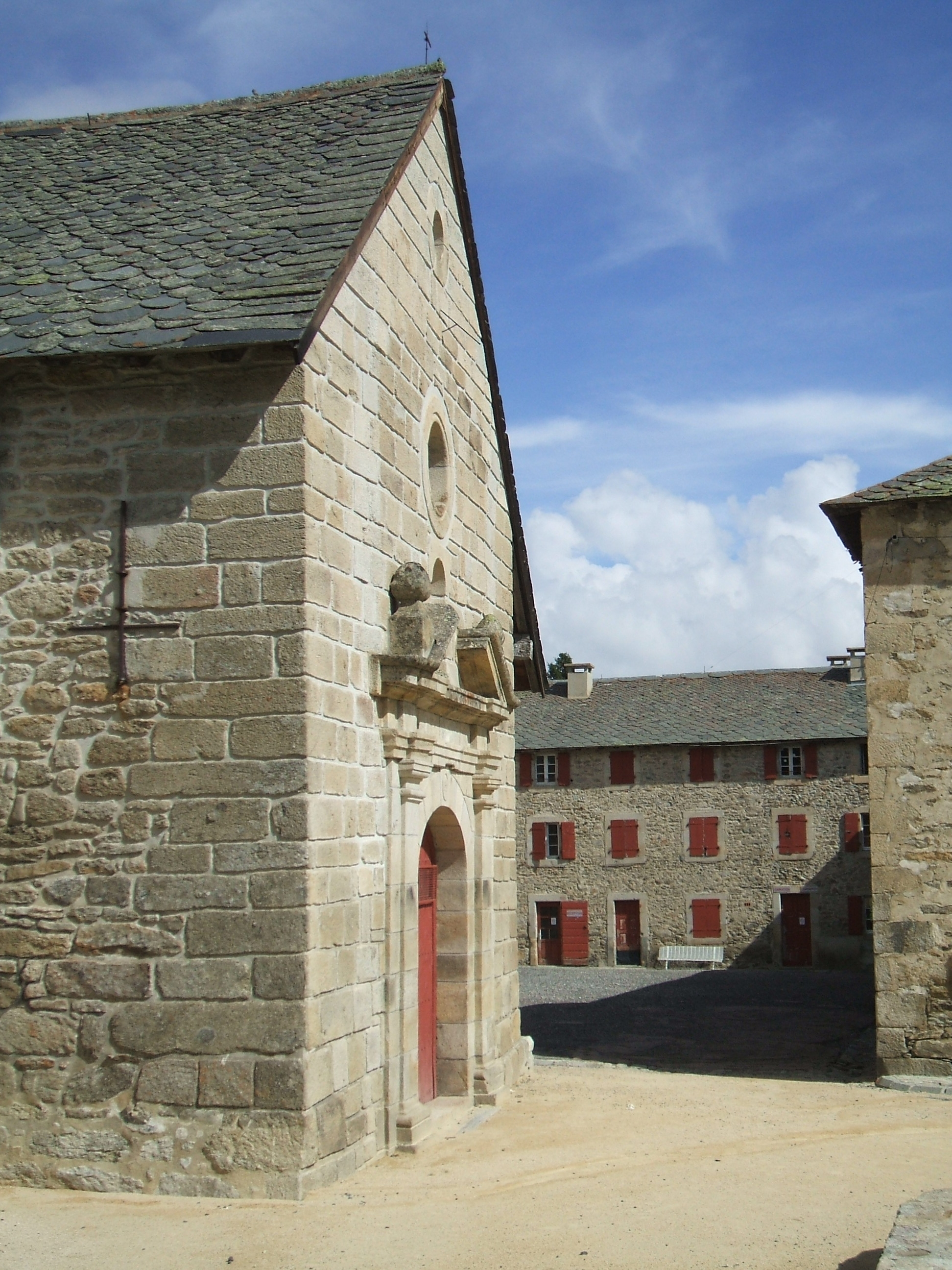 Font-Romeu-Odeillo-Via (Pyrénées-Orientales, Languedoc-Roussillon, France) : ermitage Notre-Dame. Côté sud de la cour.